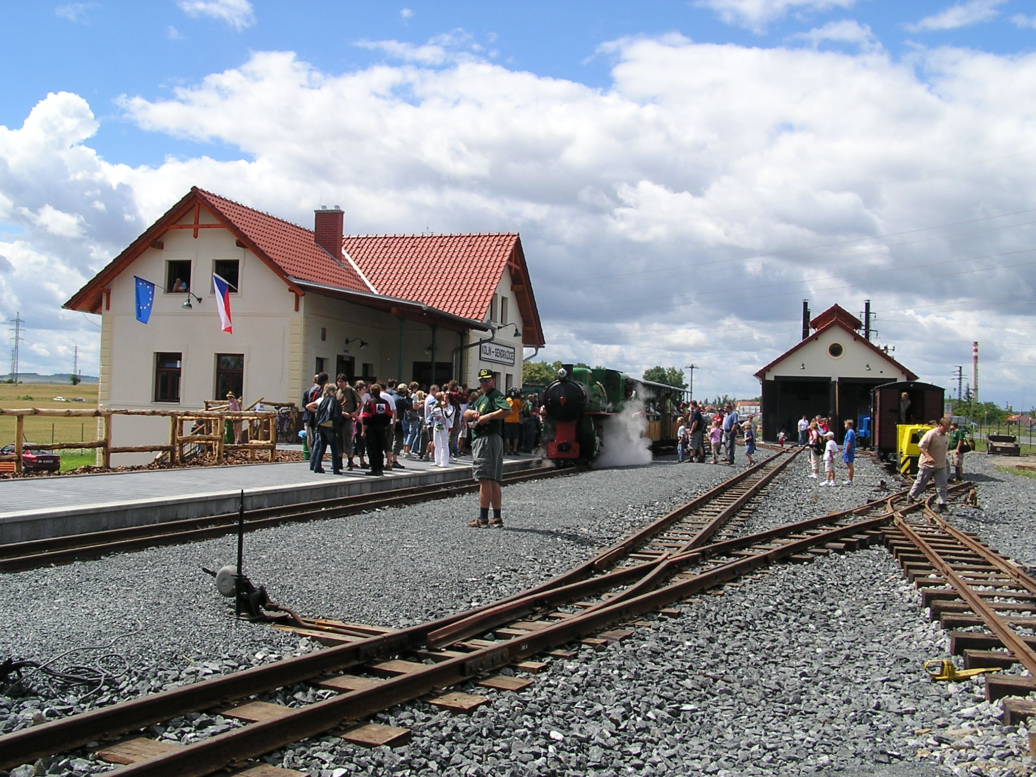 Zahájení provozu na kolínské řepařské drážce